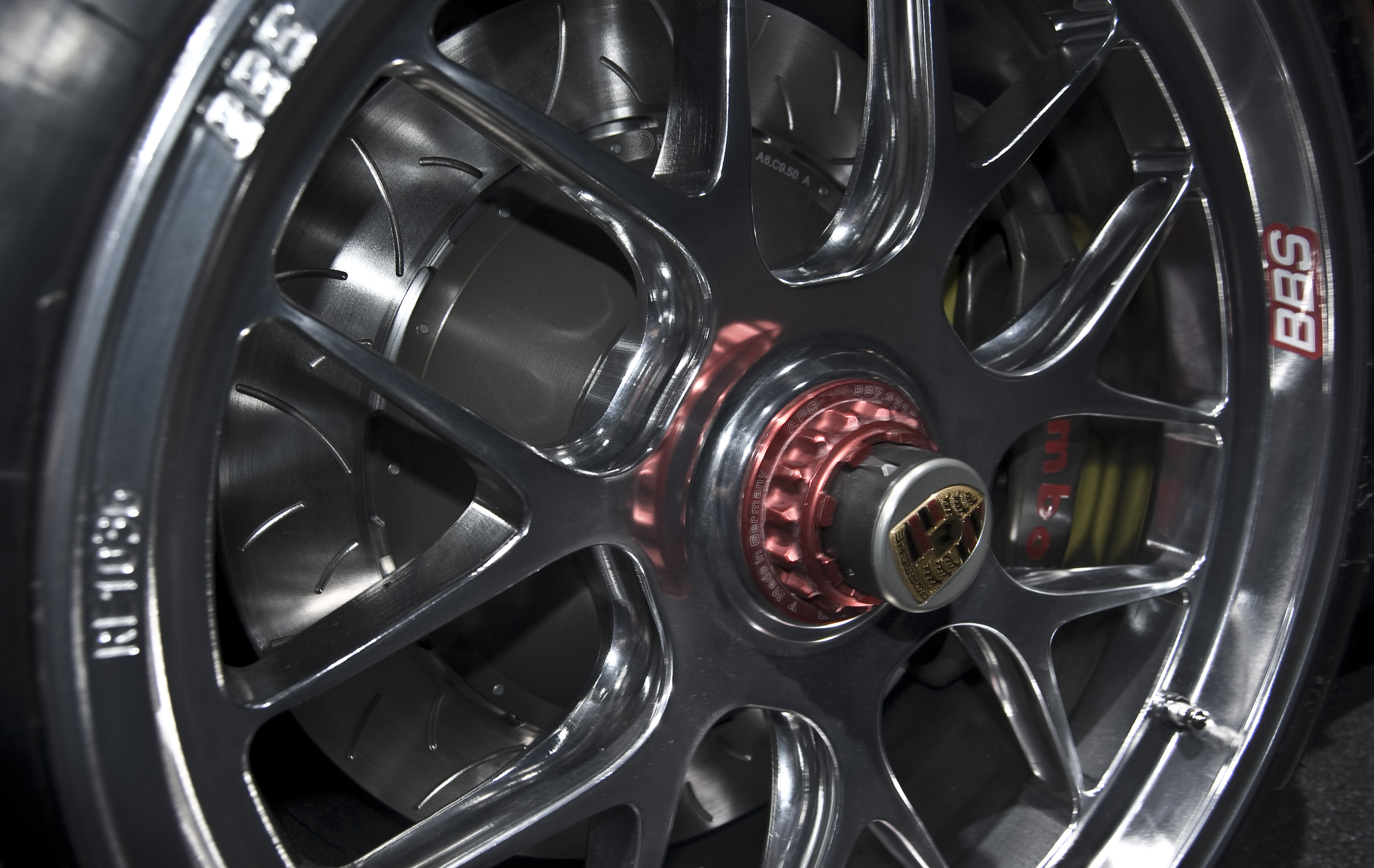 Porsche 911 GT3 R Hybrid en el Salón de Ginebra 2010.